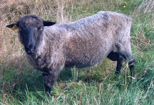 En nyklippet vædder af racen Gotlandsk pelsfår